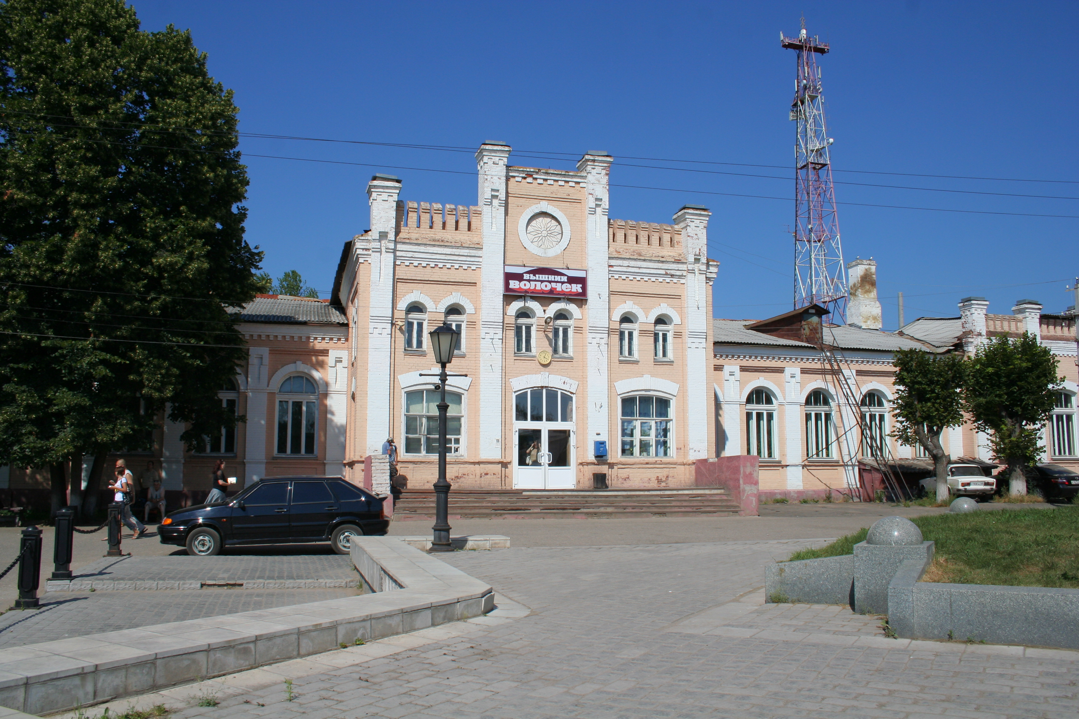 Ansichten der Stadt Wyschni Wolotschok (Oblast Twer, Russland). Der Bahnhof.